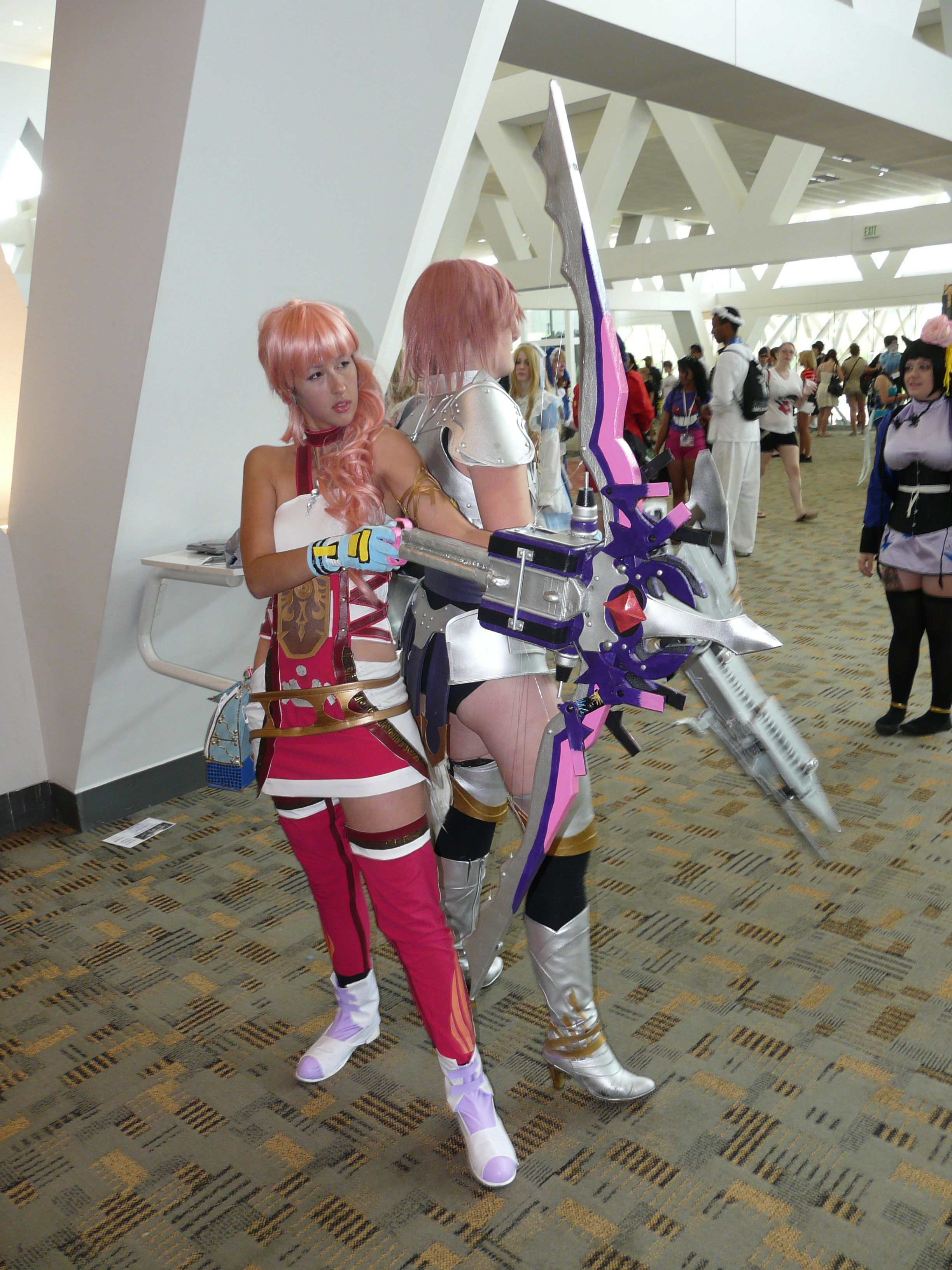 Otakon 2012 cosplay